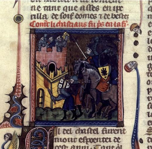 siège d'Uxellodunum enluminure médiévale origine BNF